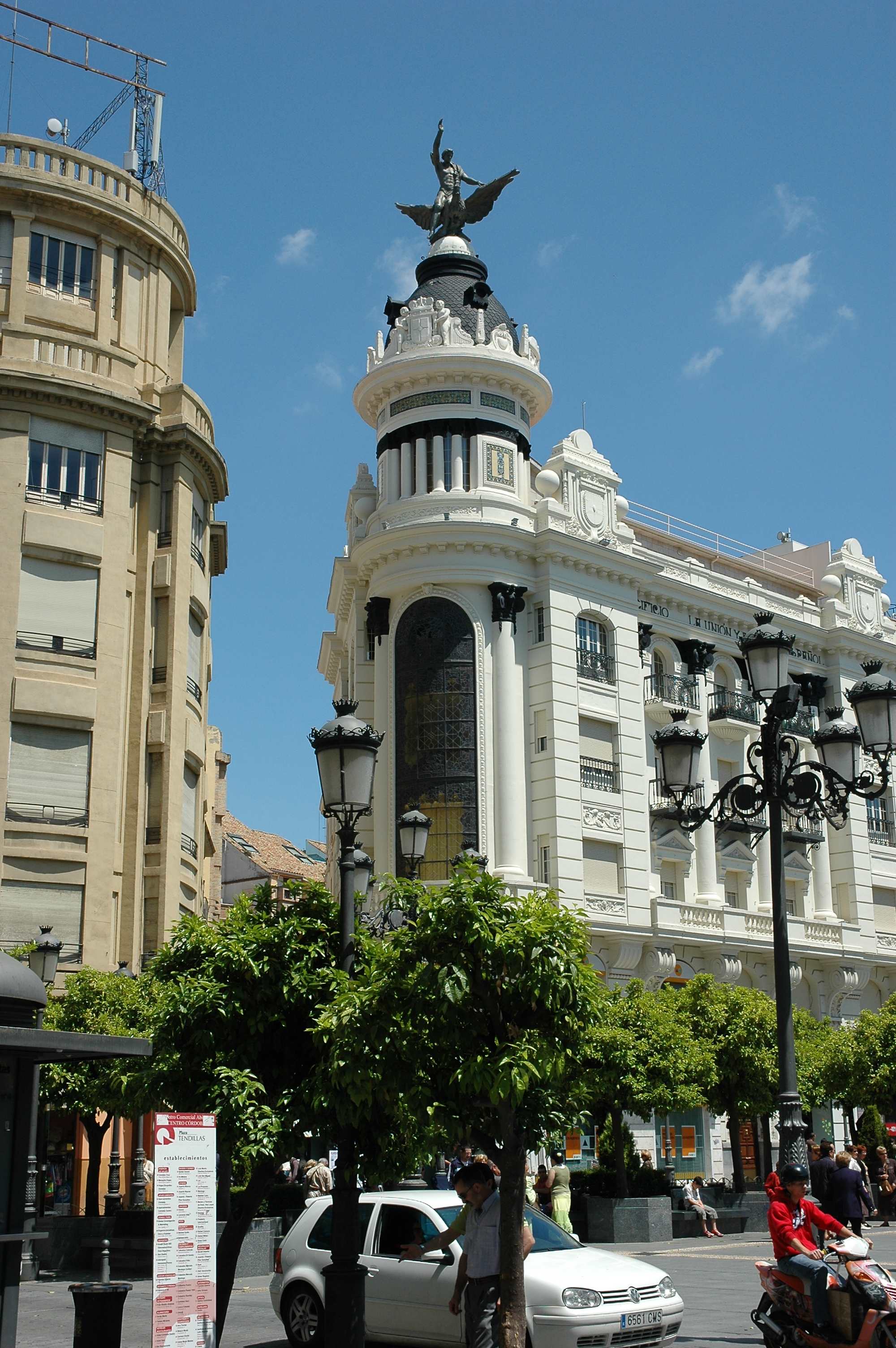 Edificio de La Unión y el Fénix en la Plaza de las Tendillas (Córdoba, España).